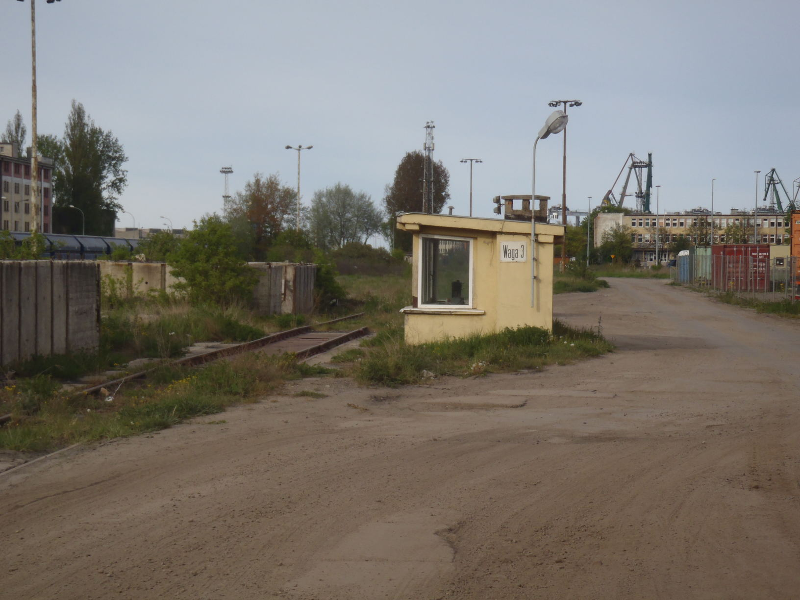 kolejowa Waga pomostowa, Port Gdynia, Gdynia